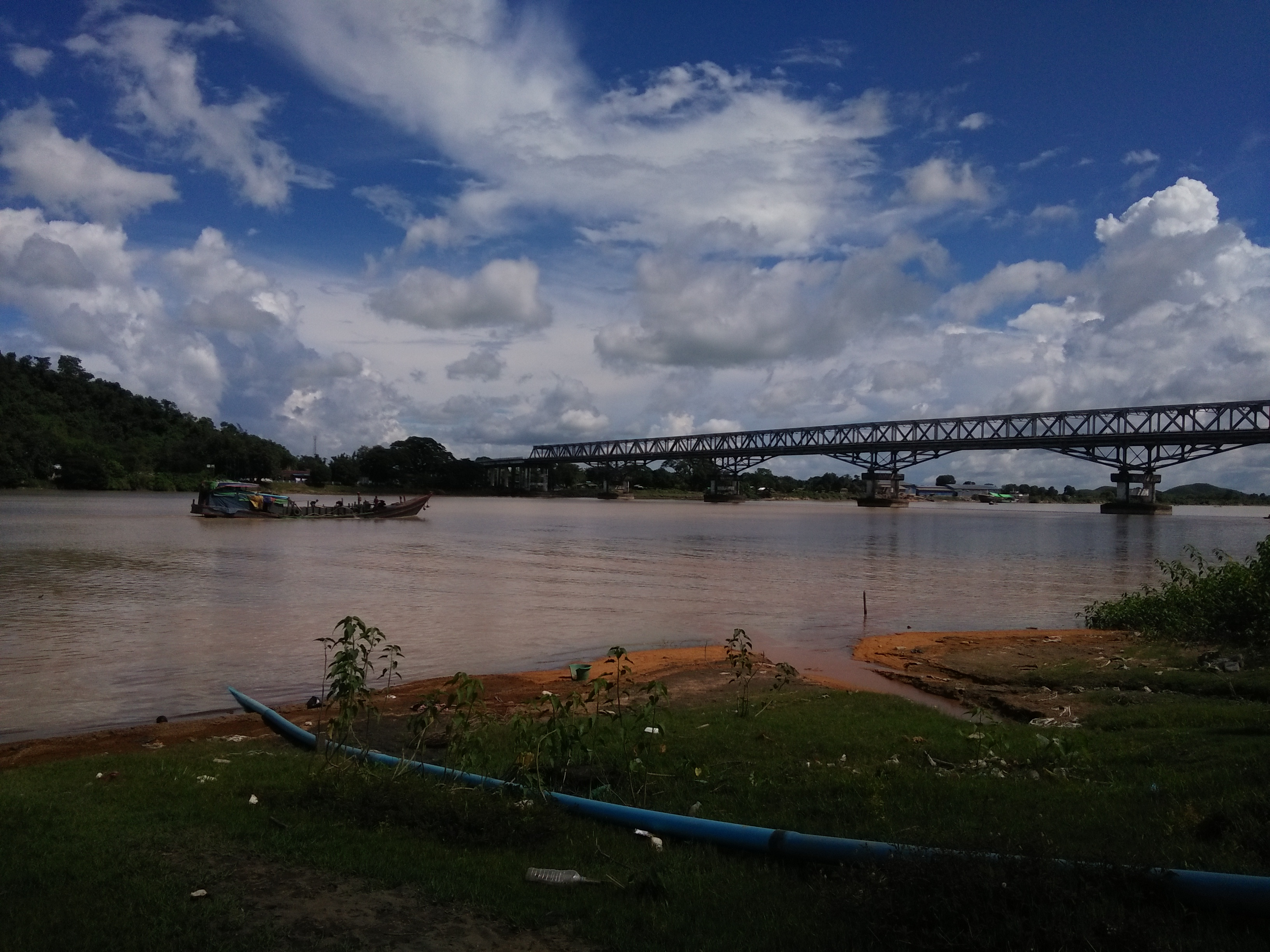 ကျောက်တော်မြို့ကမ်းနားလမ်းမှ ကုလားတန် မြစ်ရဲ့ အလှပ ပါ